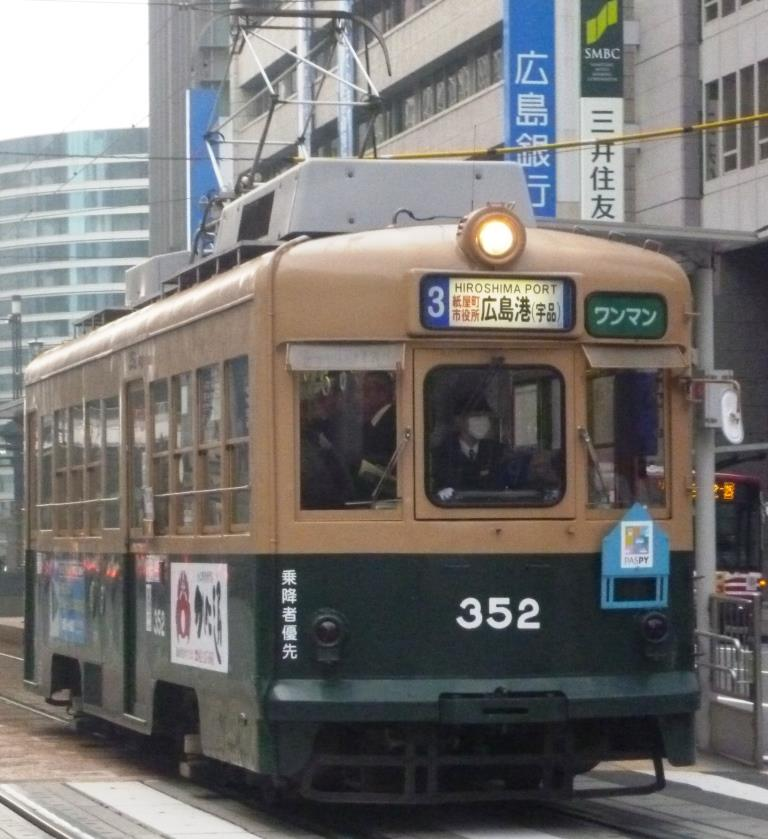 広電352号